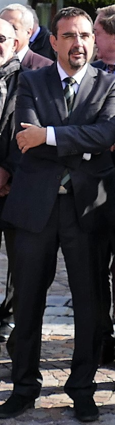 Bayerischer Landtagsabgeordneter Klaus Holetschek (CSU) bei der Einweihung des Platzes der Deutschen Einheit in Memmingen